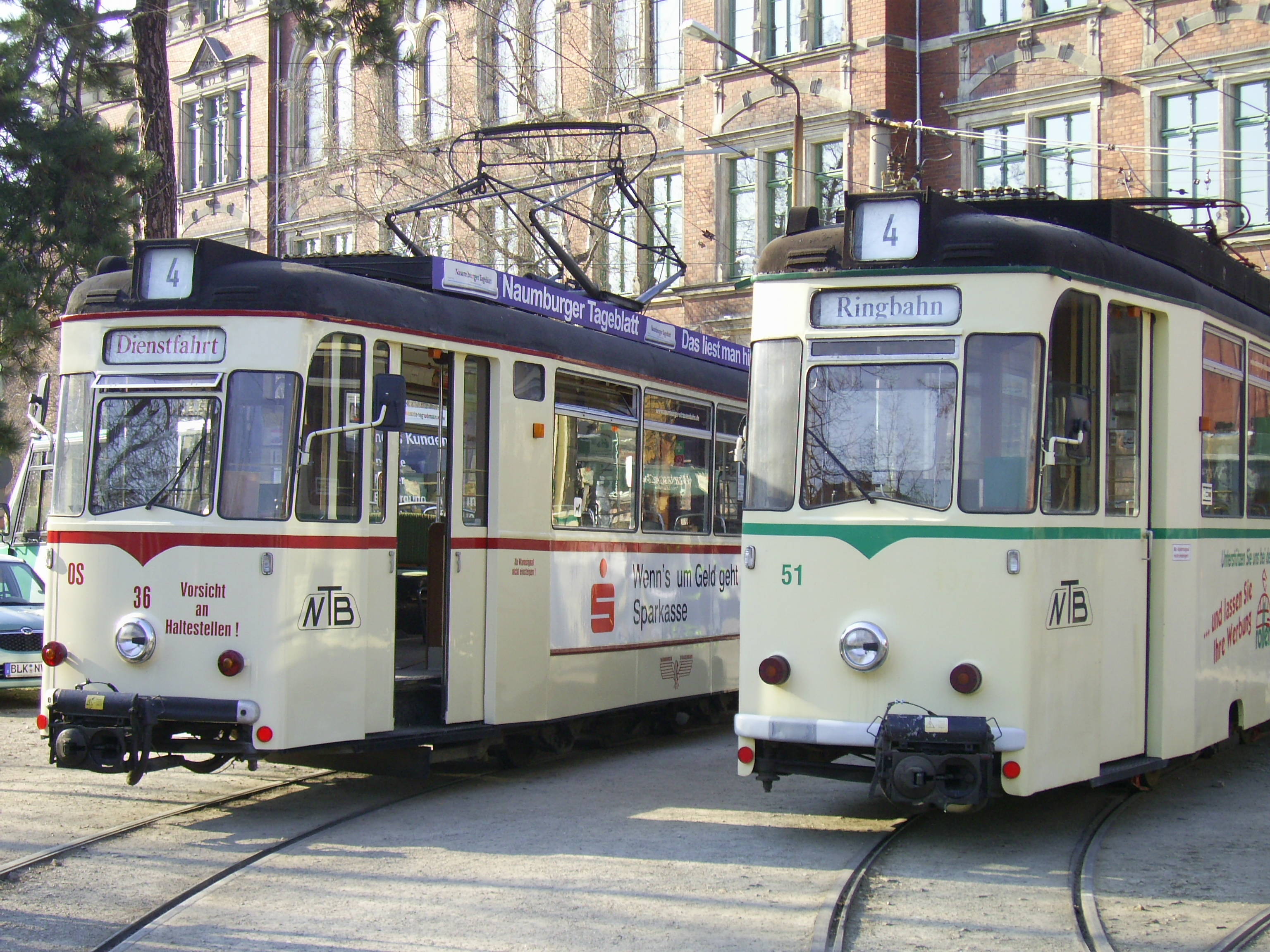 Tw 36 & Tw 51 der Naumburger Straßenbahn vor dem Depot